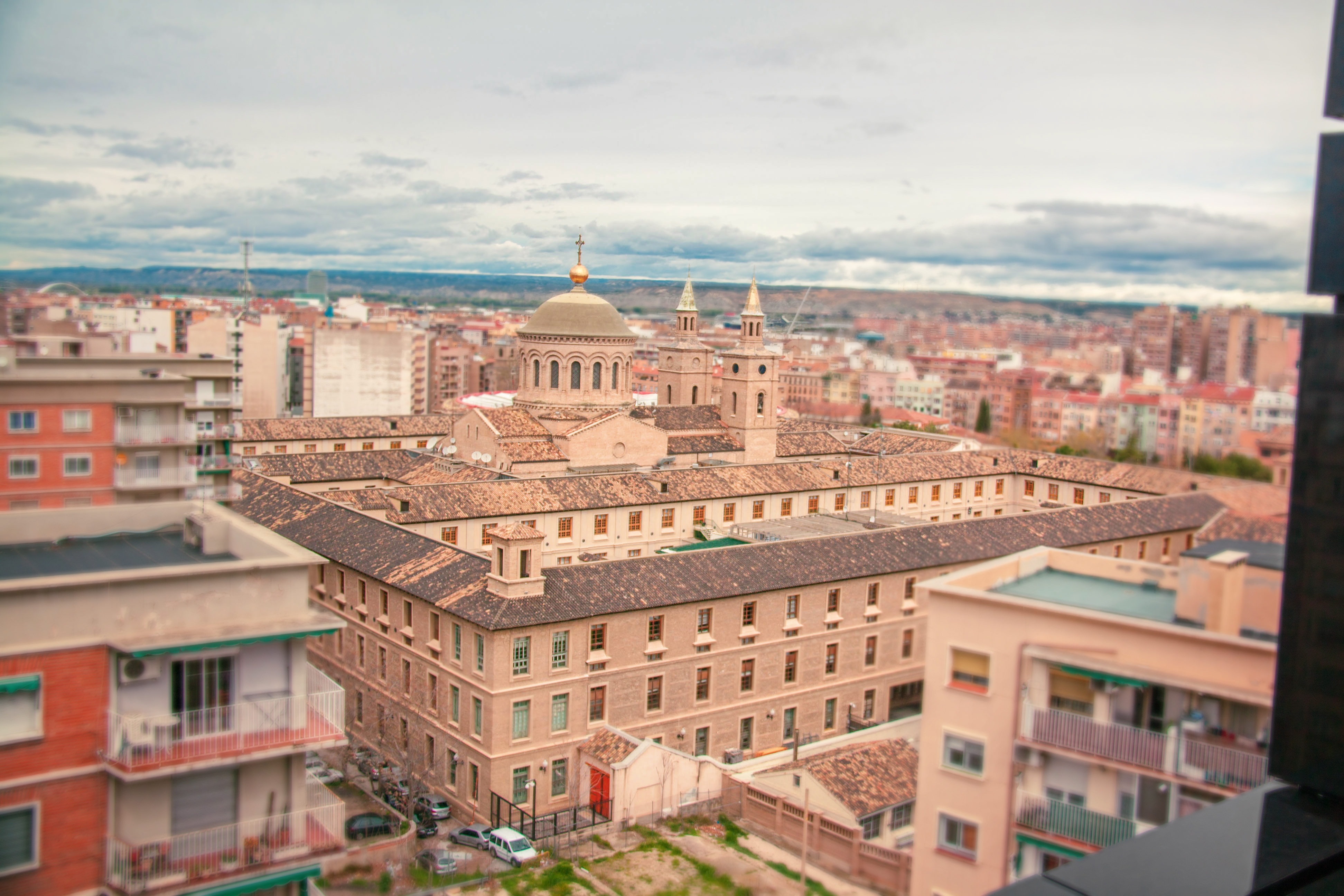 Zaragoza, España